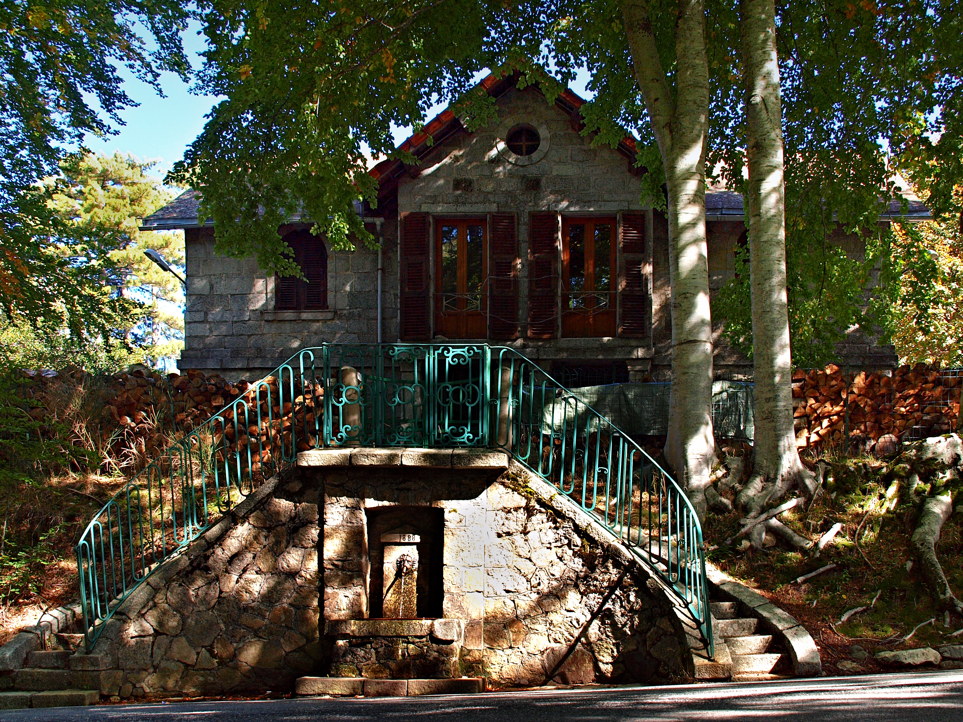 Vivario (Corsica) - Maison forestière de Vizzavona et fontaine de 1888 en bordure de la RN 193